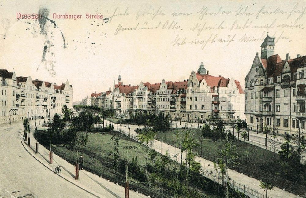 La calle.